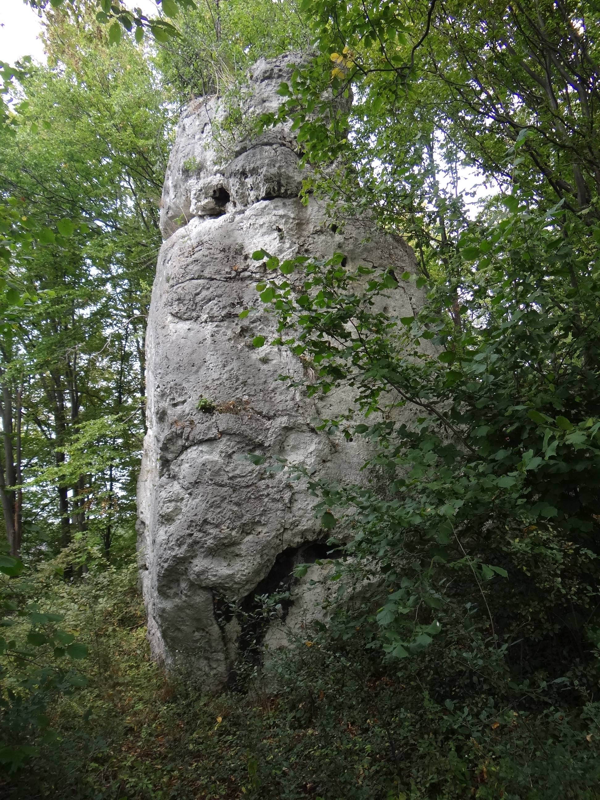 Skała Hyla w Morsku